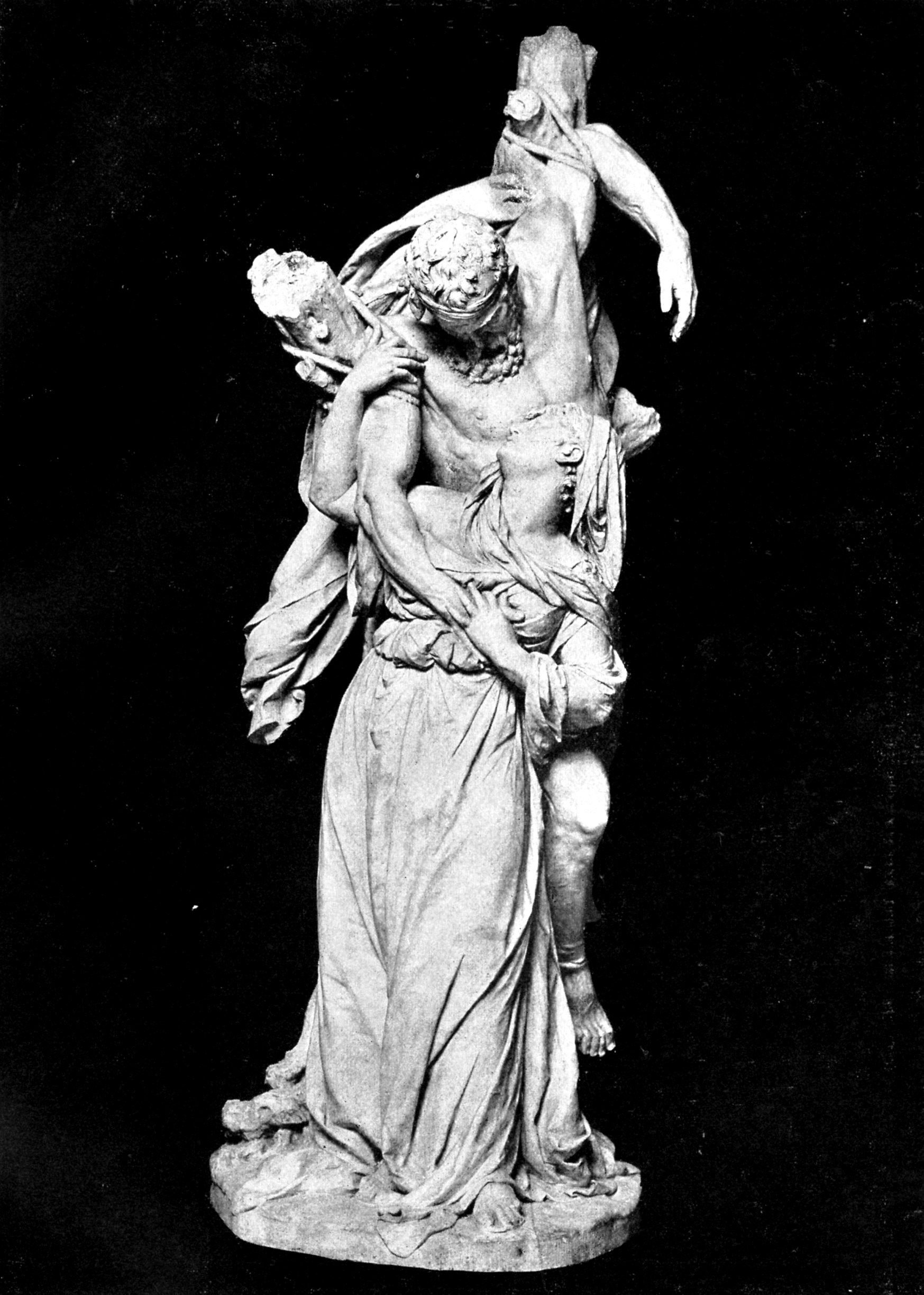 Skulptur "Spartacus" von Michel Lock.